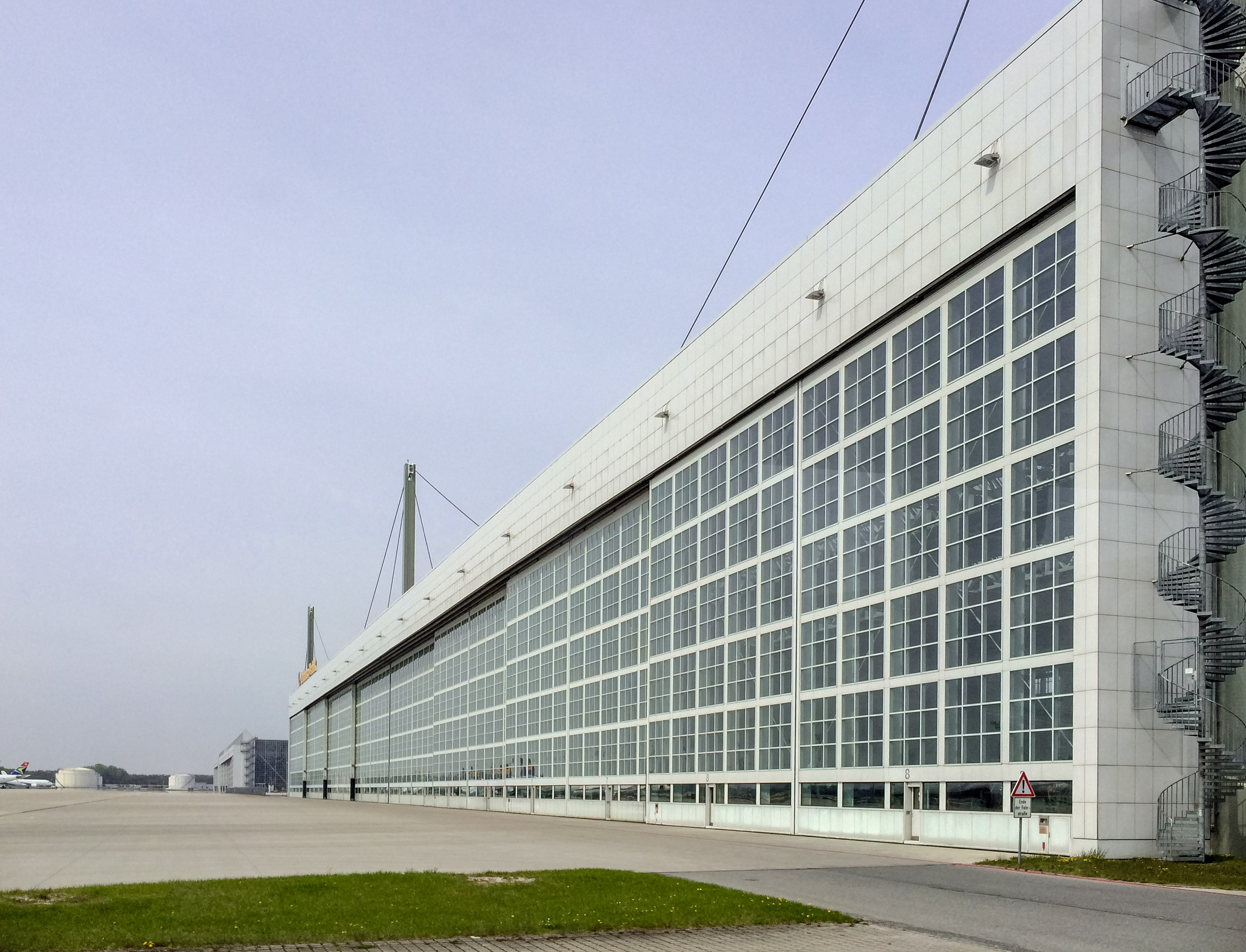 Munich Airport Lufthansa Wartungshalle